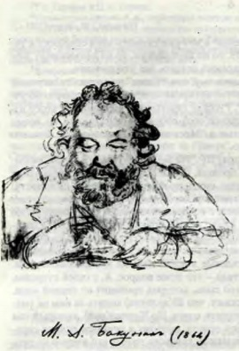 Портрет М. А. Бакунина. Рисунок карандашом Э.А.Дмитриева-Мамонова. Флоренция